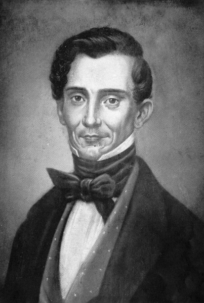 Juan Manuel Cagigal y Odoardo